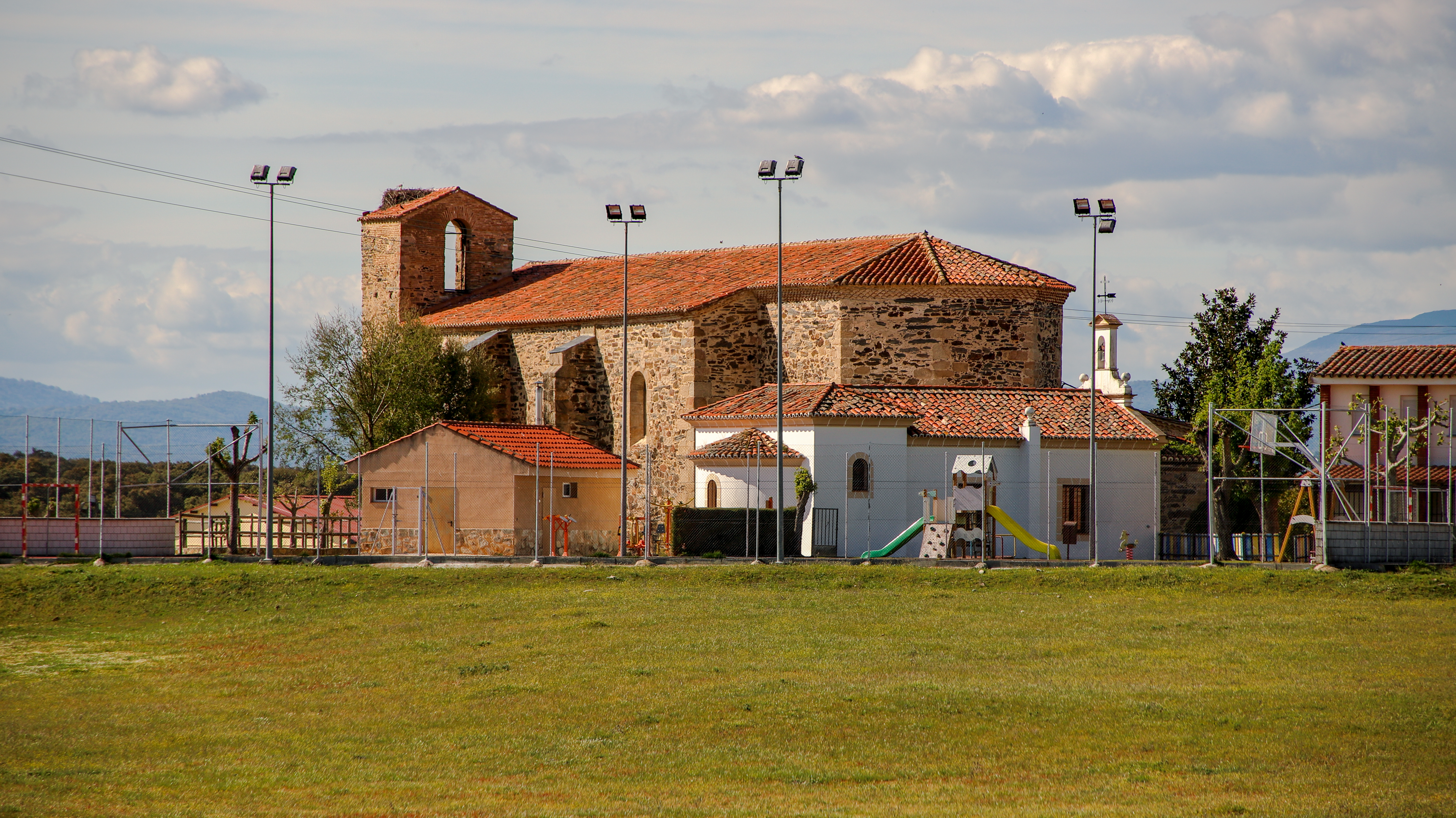 Toril es un municipio de la comarca Campo Arañuelo, en la provincia de Cáceres.